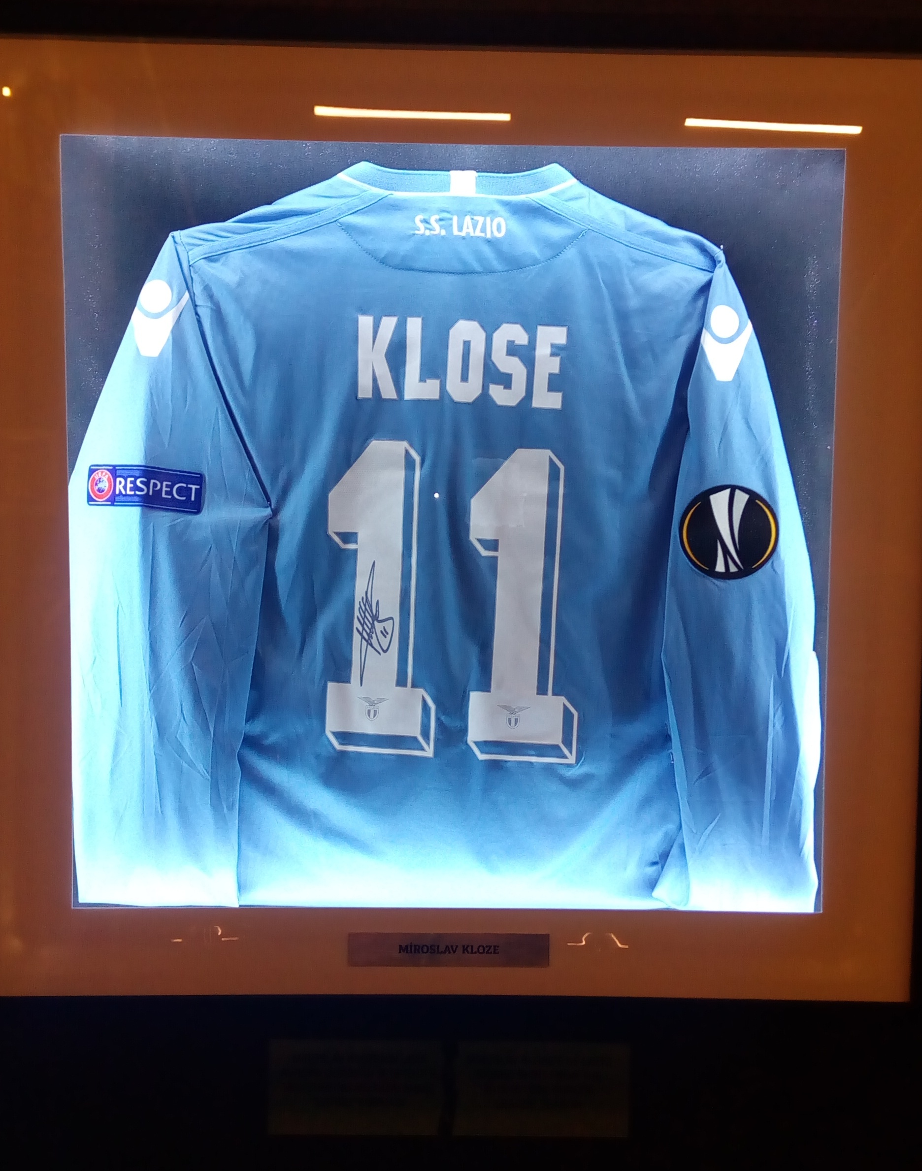 Avropa Liqası Muzeyi Bakıda